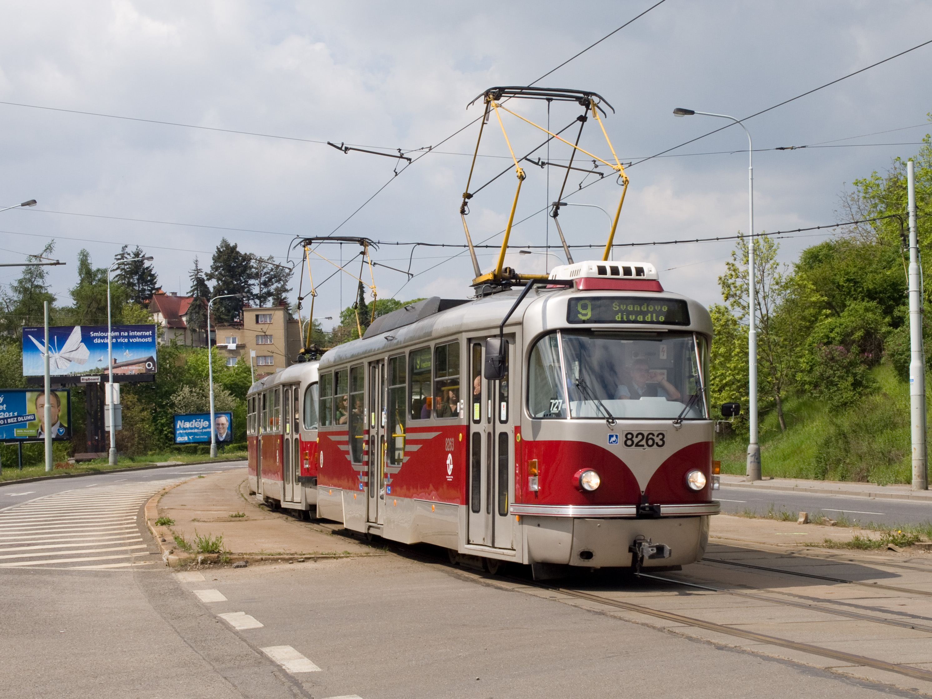 Typ vozu/type: Tatra T3R.PLF Evidenční číslo/registration number: 8263 Linka/line: 9 (vypravení typu Tatra T3R.PLF kvůli přejezdu na linku 22) Zastávka(y)/stop(s): Krematorium Motol – Hlušičkova Trať/track: Motol – Sídliště Řepy Změny v linkovém vedení způsobeny Pražským mezinárodním maratonem 2010